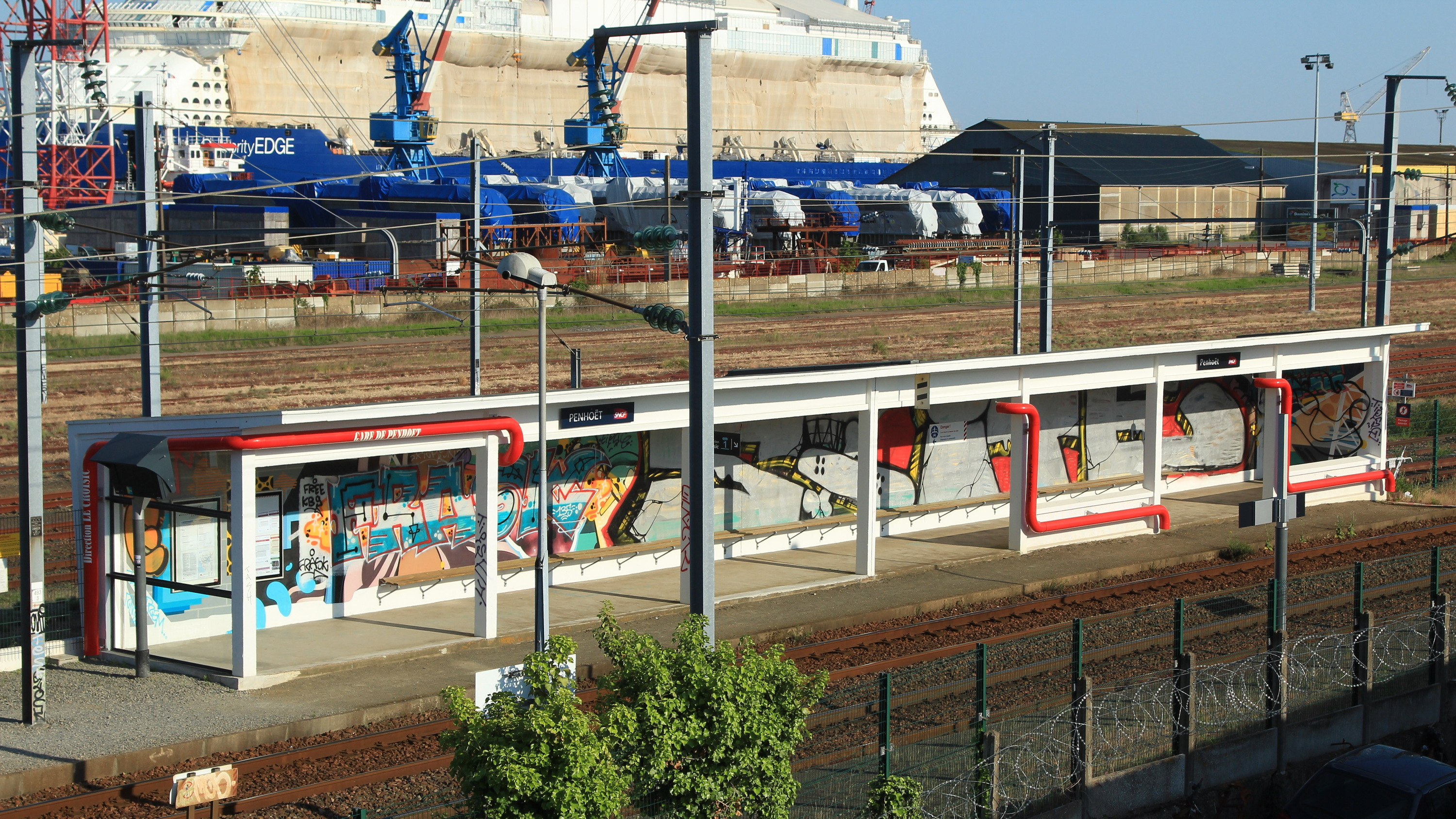 Vue de l'abri de quai de la gare de Penhoët desservit par les trains en provenance de Savenay.